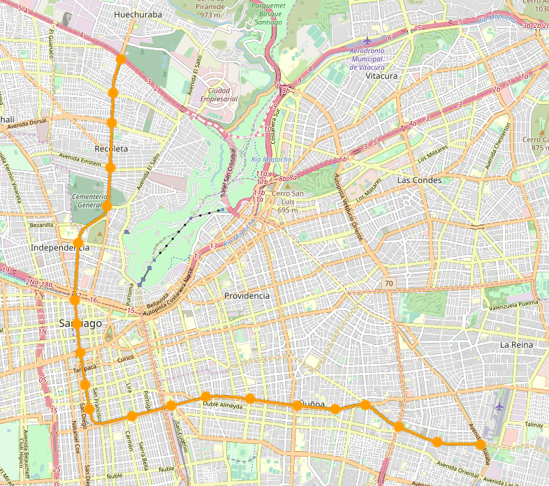 Plano del trazado del proyecto original de la Línea 3 del Metro de Santiago, de acuerdo al proyecto BCEOM-SOFRETU-CADE de 1968.